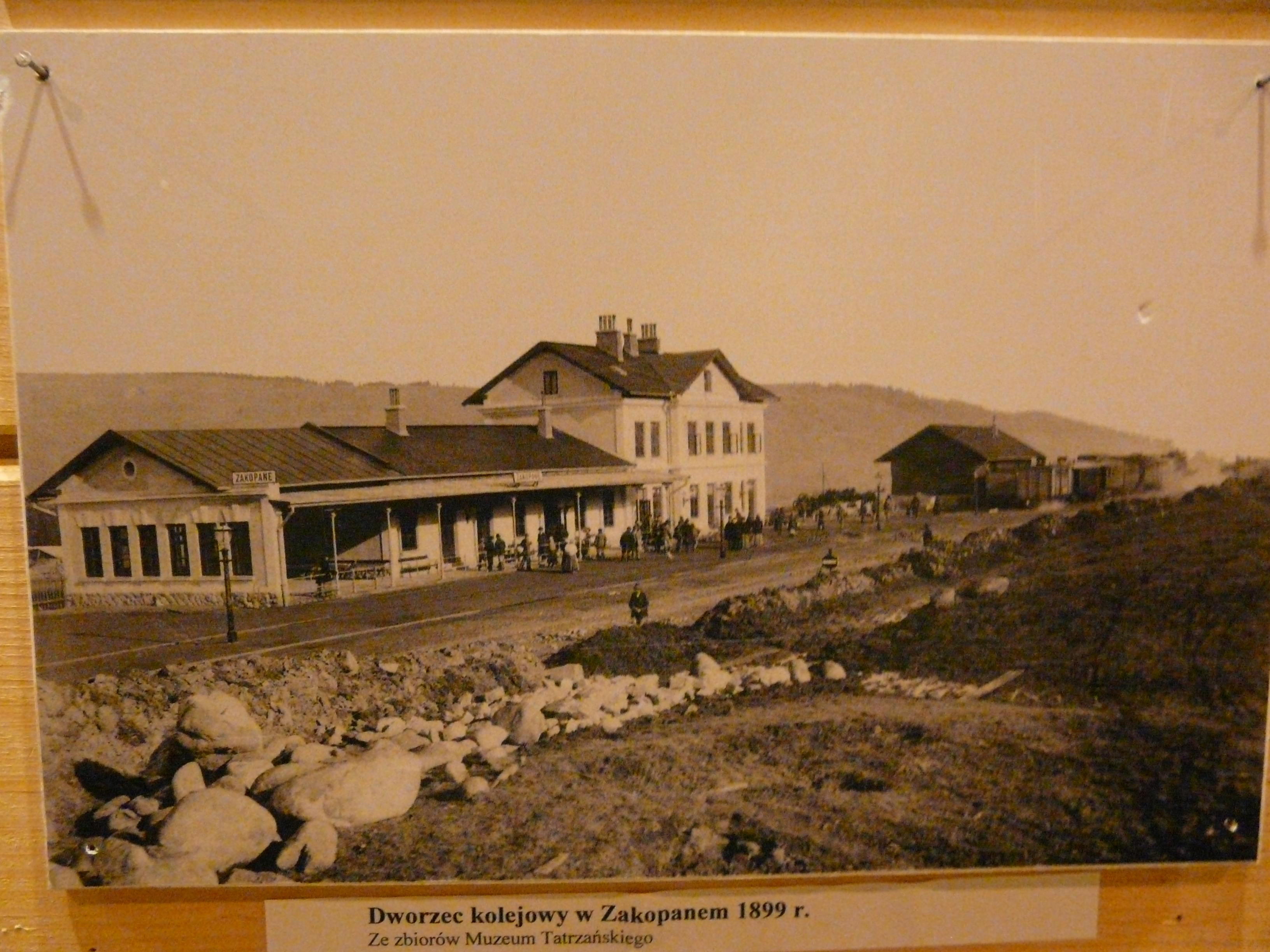 Zakopane. Zespół dworsko-parkowy w Kuźnicach, okolice i wnętrza. Dworzec kolejowy w Zakopanem, 1899 r.